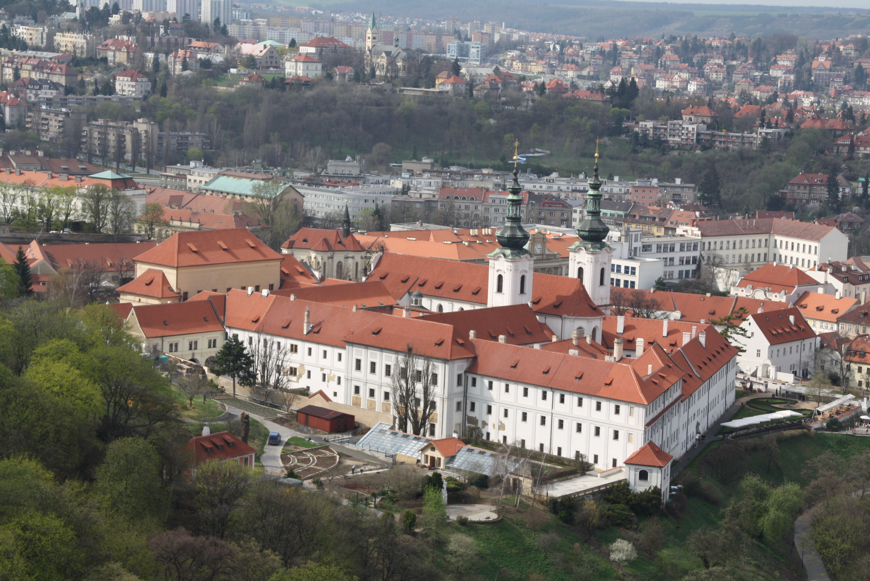 Strahovský klášter, Pohořelec, Strahovské nádvoří 132/1 (hlavní budova), 126/8, 127/7, 128/6, 130/2, 131/5, 133/3, 134/13, 135/12, 136/9, 301/10, 302/11, Strahovská 128/20, Úvoz 155/15, 157/11, Hradčany.